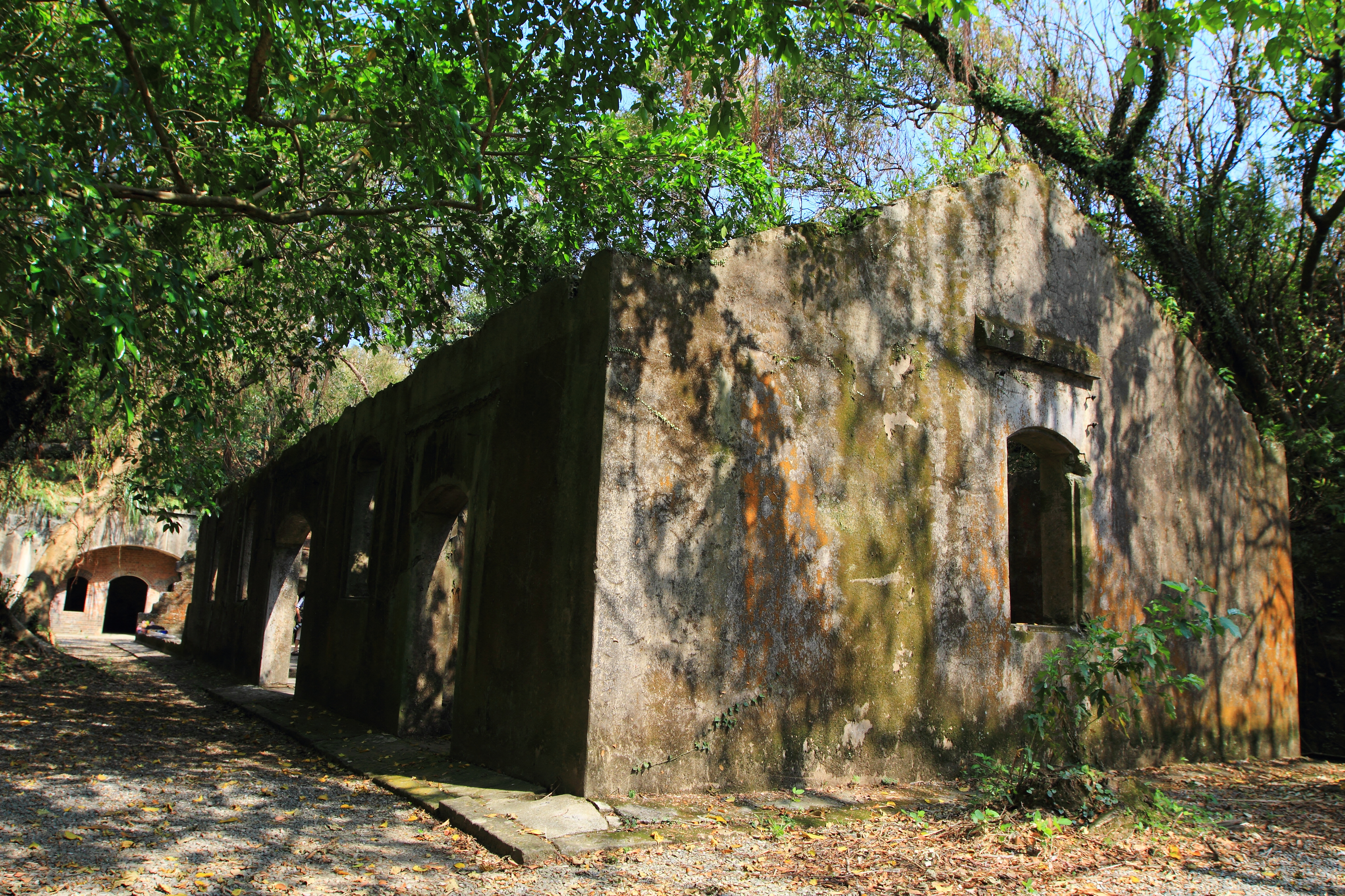 CA09602000306 大武崙砲台